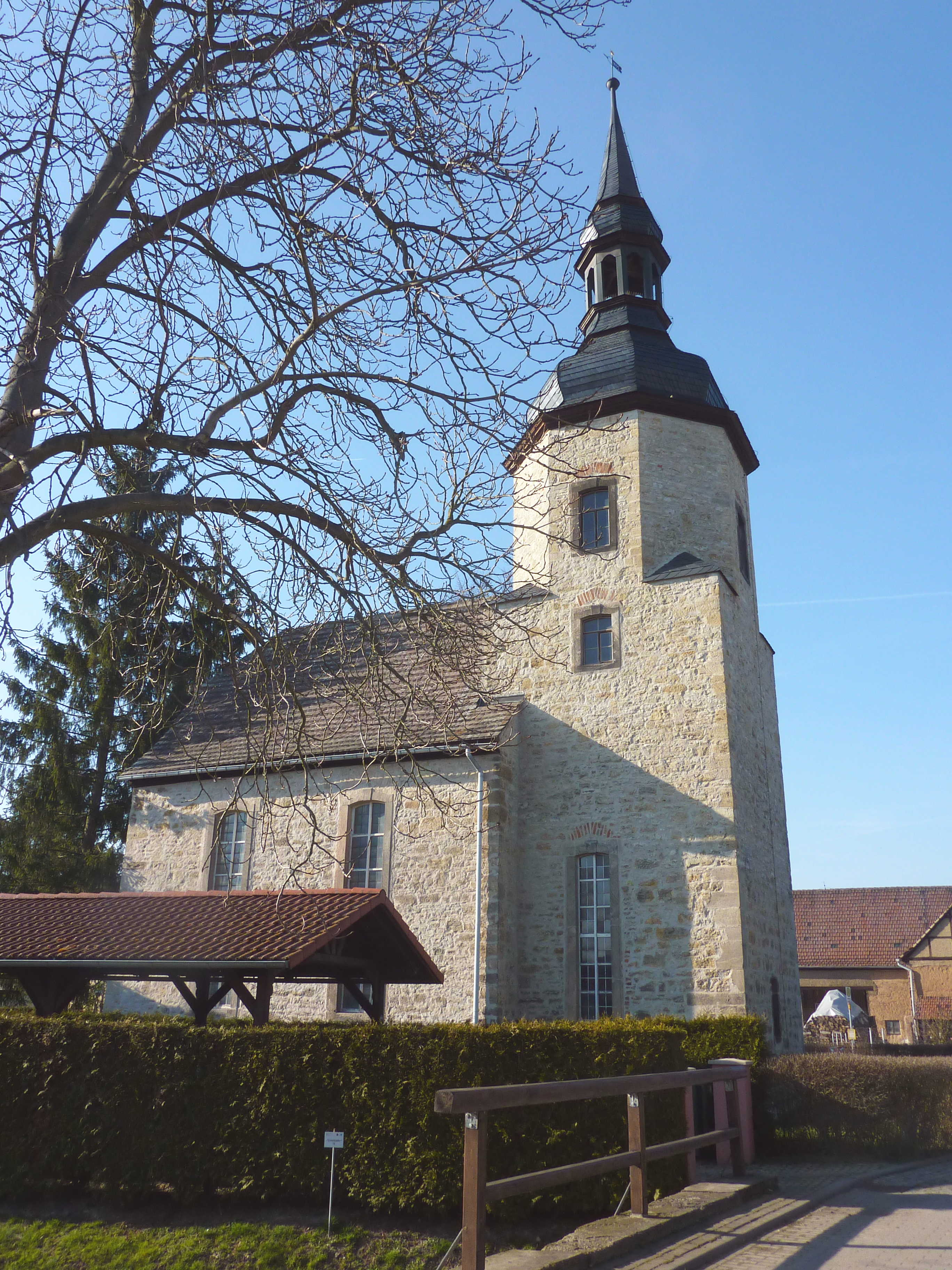 Kirche in Zäckwar, einem Ortsteil von Lanitz-Hassel-Tal im Burgenlandkreis in Sachsen-Anhalt/Deutschland, Ansicht von Süden